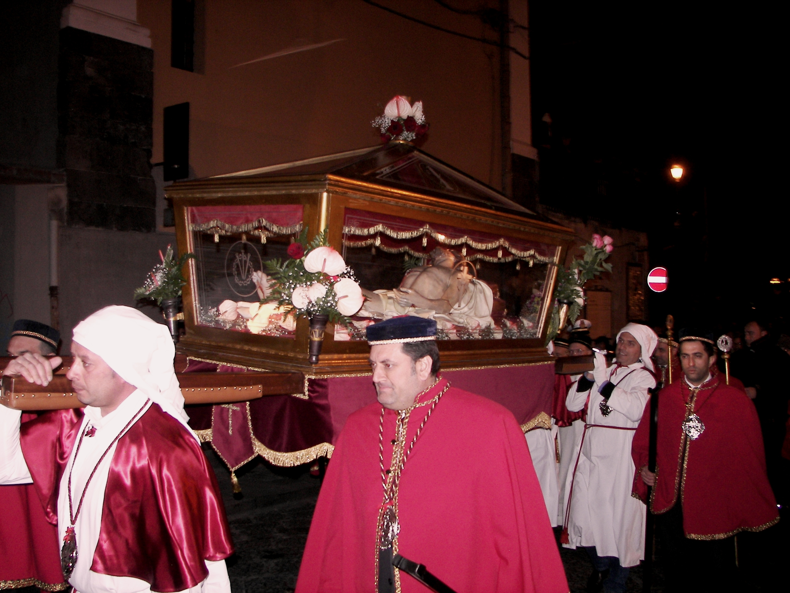 Santa Maria di Licodia. Processione funebre del VenerdÃ¬ Santo. I confrati del Santissimo Sacramento, nella tradizionale cappa, scortano il feretro di GesÃ¹ Morto.